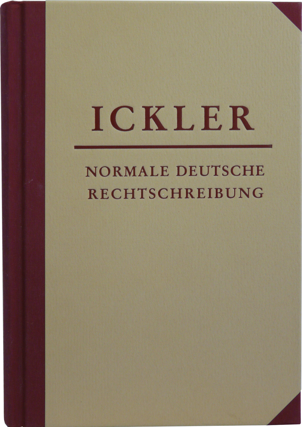 Buchdeckel: Theodor Ickler: Normale Deutsche Rechtschreibung